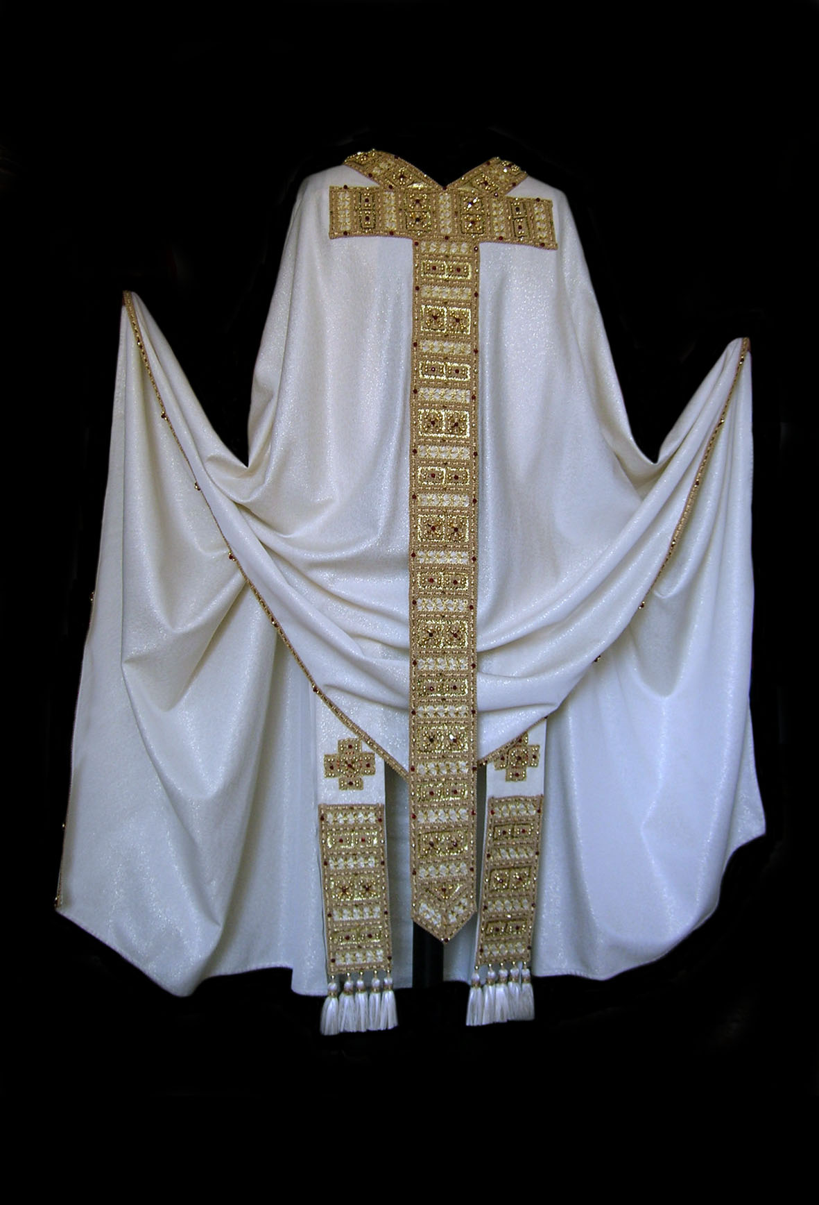 autore: casula cattolica da inserire nella voce CASULA